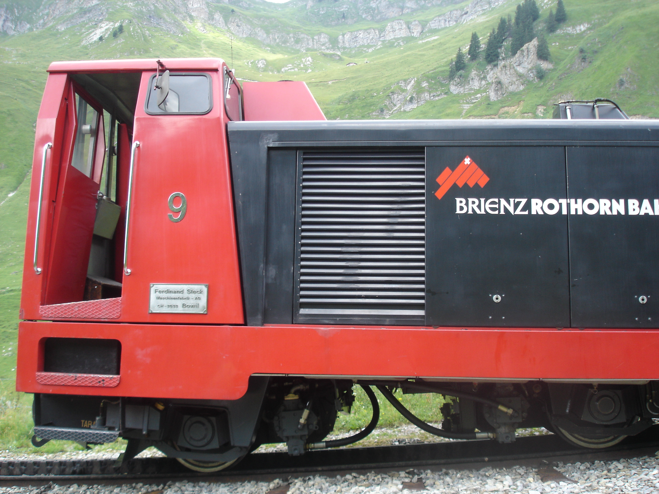 Brienzer Rothorn Bahn Diesellok Nr. 9